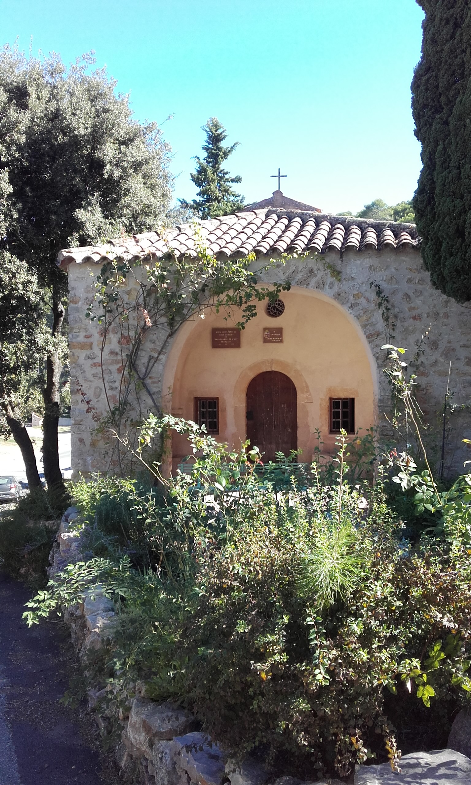 Var, Lorgues, rue de St Honorat : Chapelle Saint-Honorat, XIVe siècle. Restaurée par les Amis de Saint-Ferréol, Vieux Lorgues et Sauvegarde de l'Art français, 1973-1981-1982